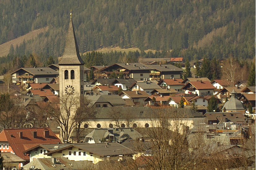 Kath. Pfarrkirche hll. Johannes Evangelist und Johannes der Täufer und Grabplatten